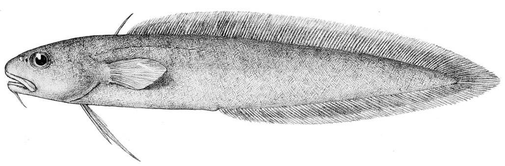 Muraenolepis microps